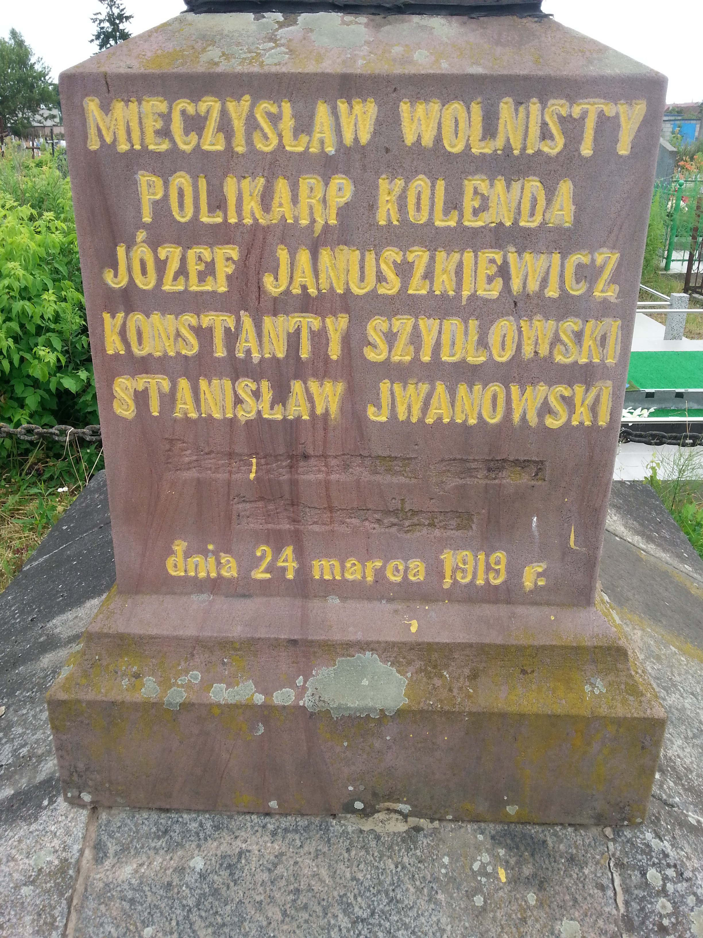 Widoczny usunięty napis na pomniku informujący o zabiciu powstańców przez bolszewików. Lipiec 2015